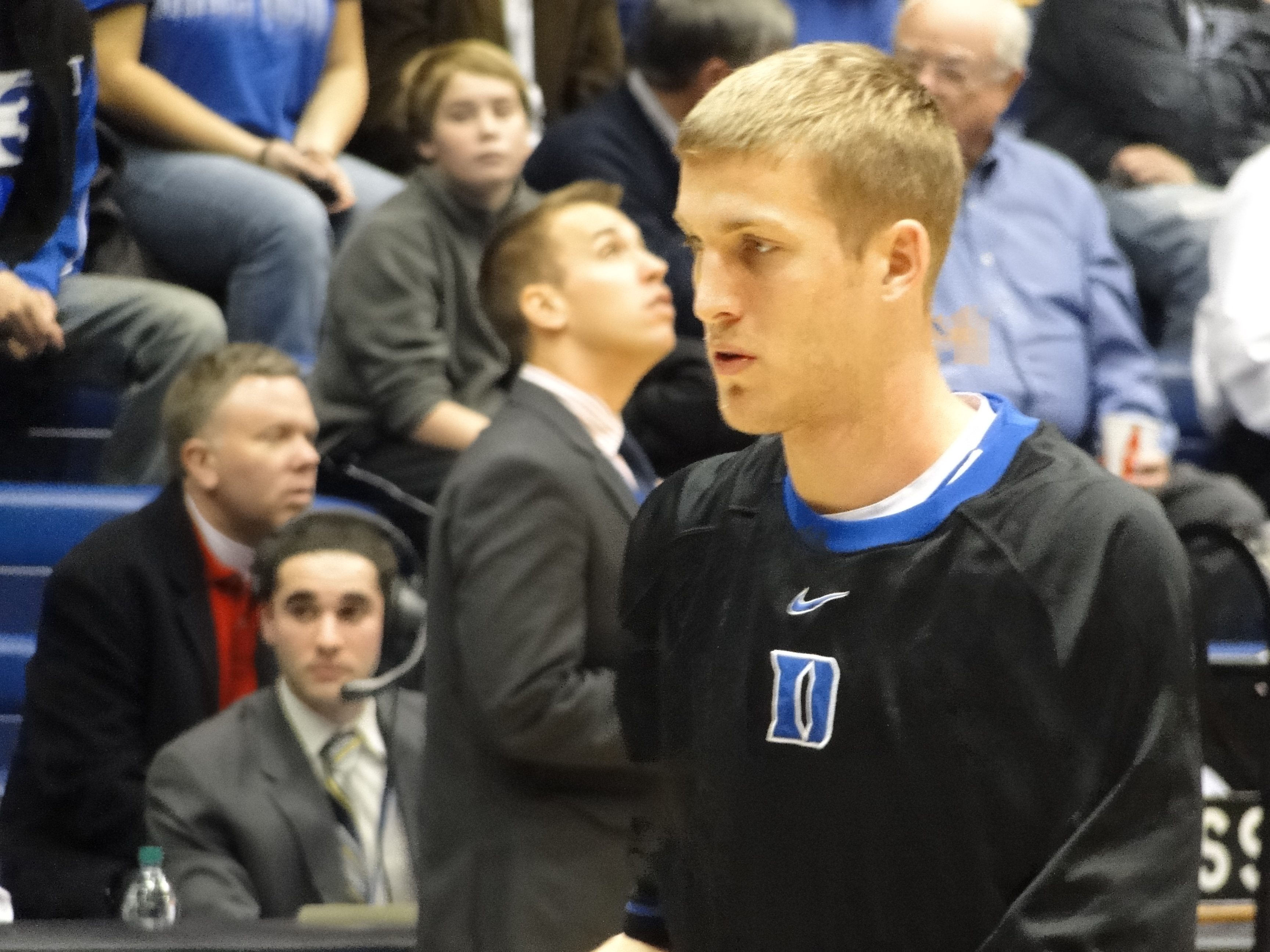 Mason Plumlee